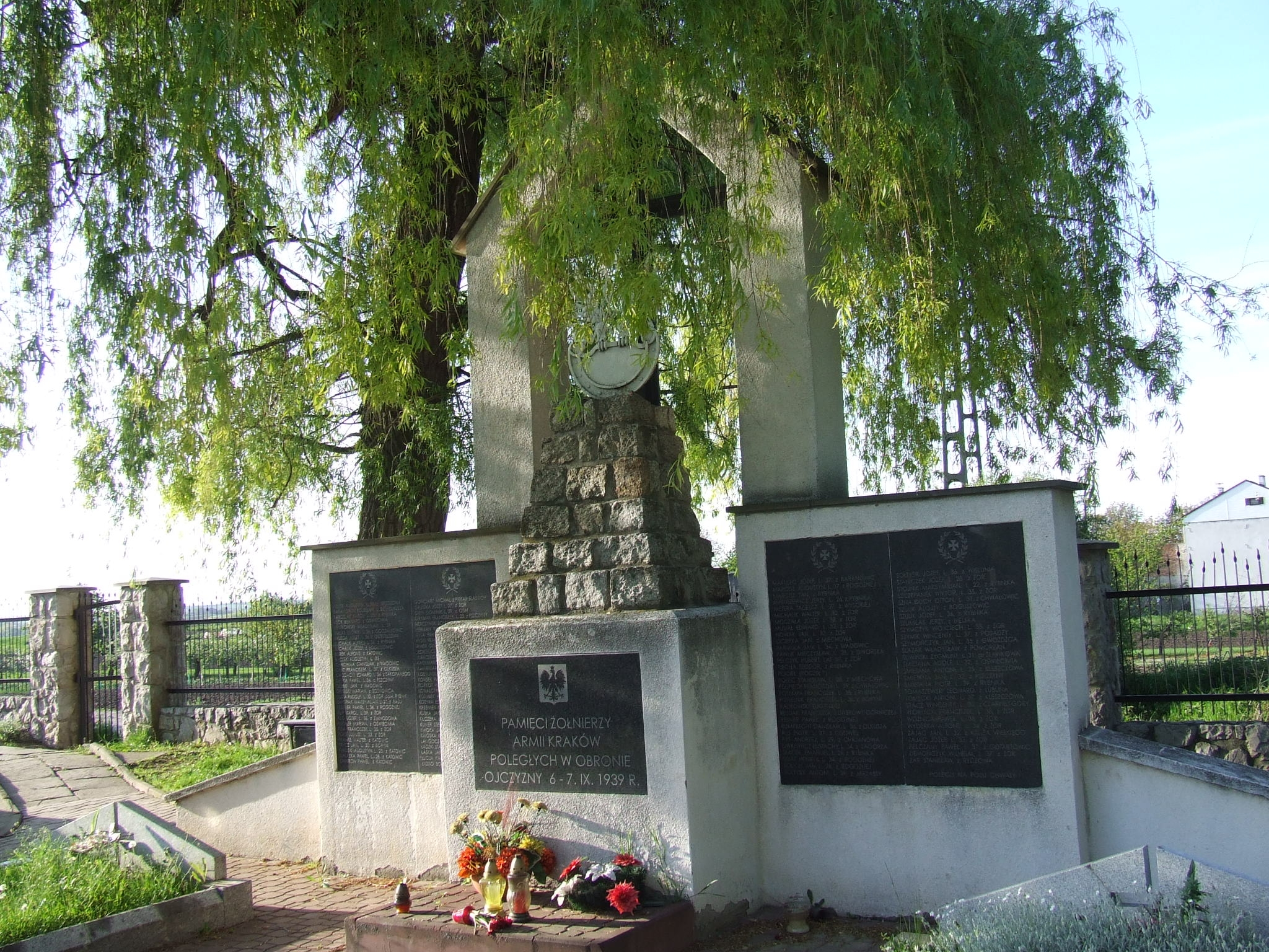 Proszowice, the catholic cememtery/cmentarz katolicki w Proszowicach - pomnik poległych 6-7.IX.1939 żołnierzy A.K.